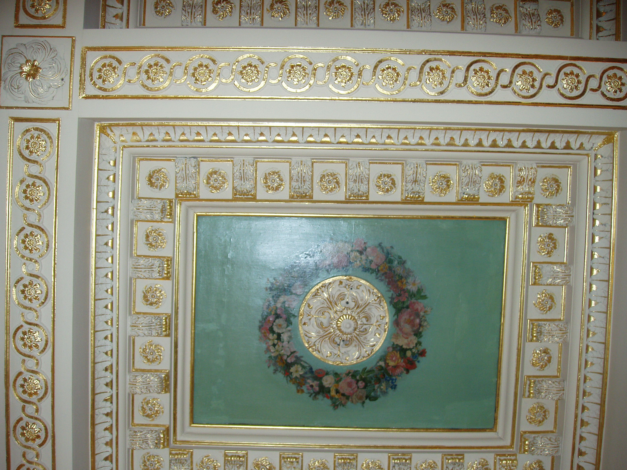 Plafond restauré , photographie prise en 2005